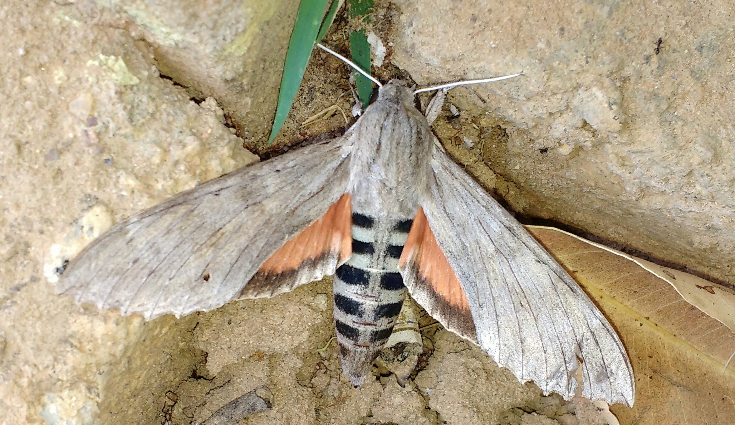 Exemplar fêmea da Erinnyis ello, na cidade de Caetité, estado da Bahia, Brasil.